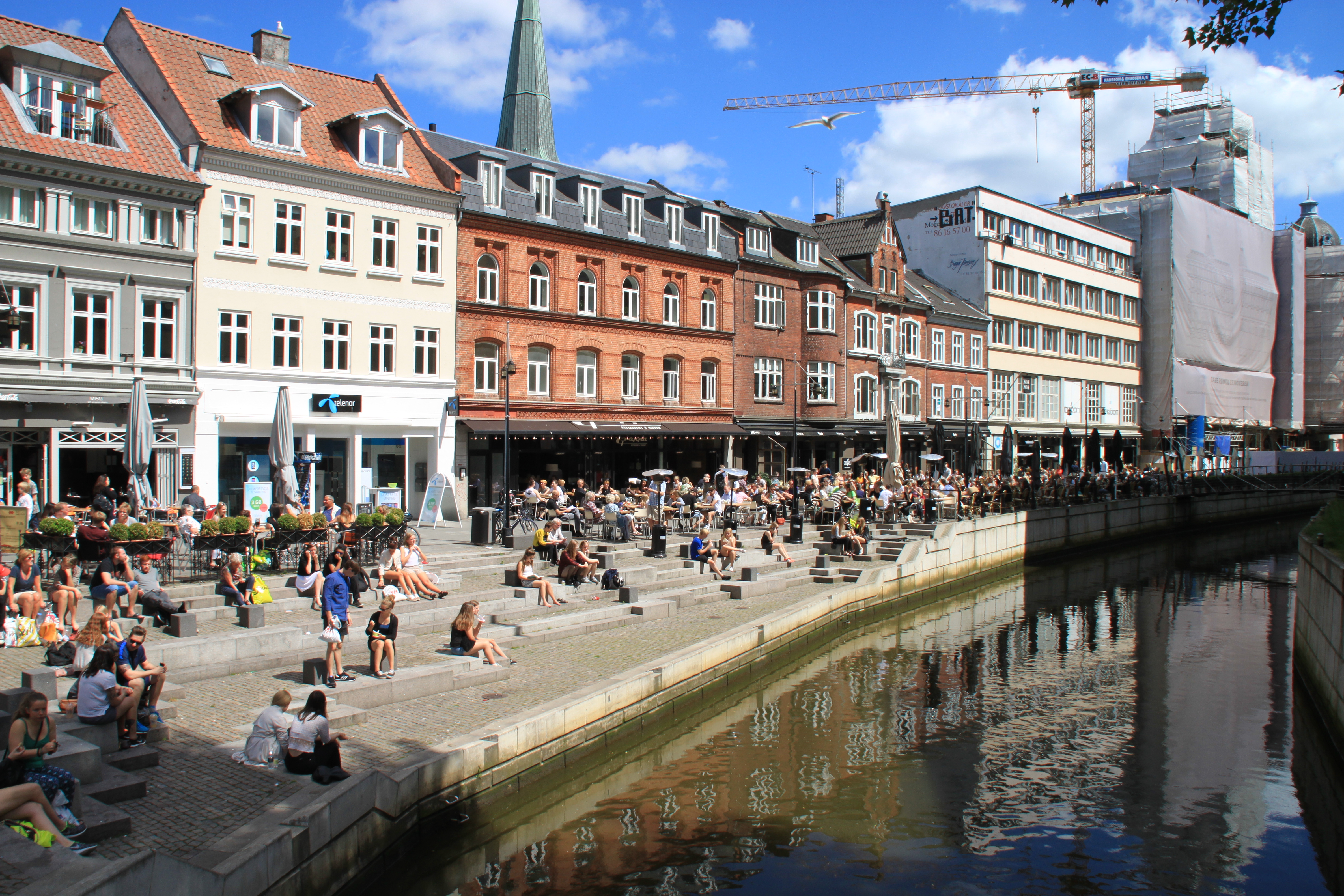 Aarhus am Åboulevarden